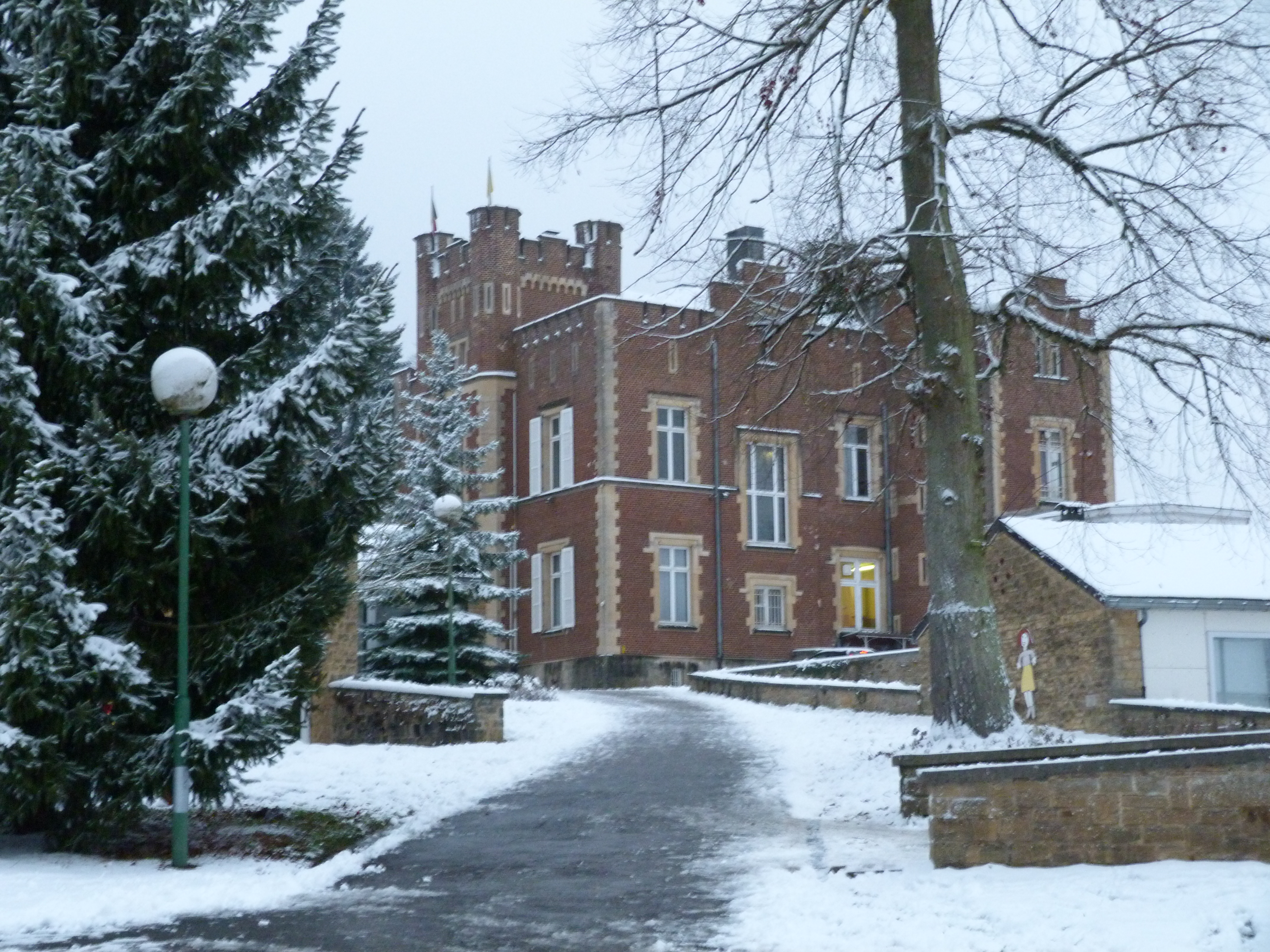 Le Castel à Messancy